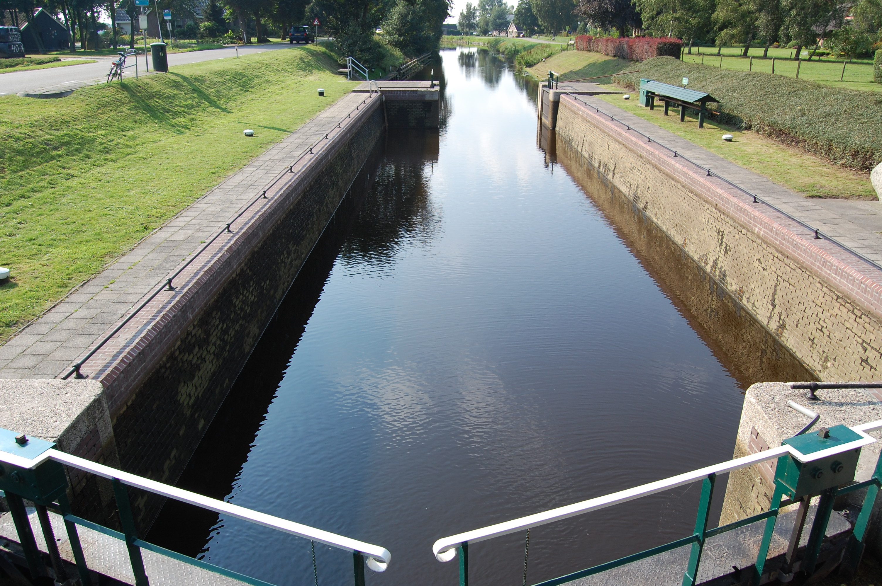 De kolk van de Damsluis in de Opsterlandse-Compagnonsvaart. Deze sluis ligt op de grens van de provincies Friesland en Drente